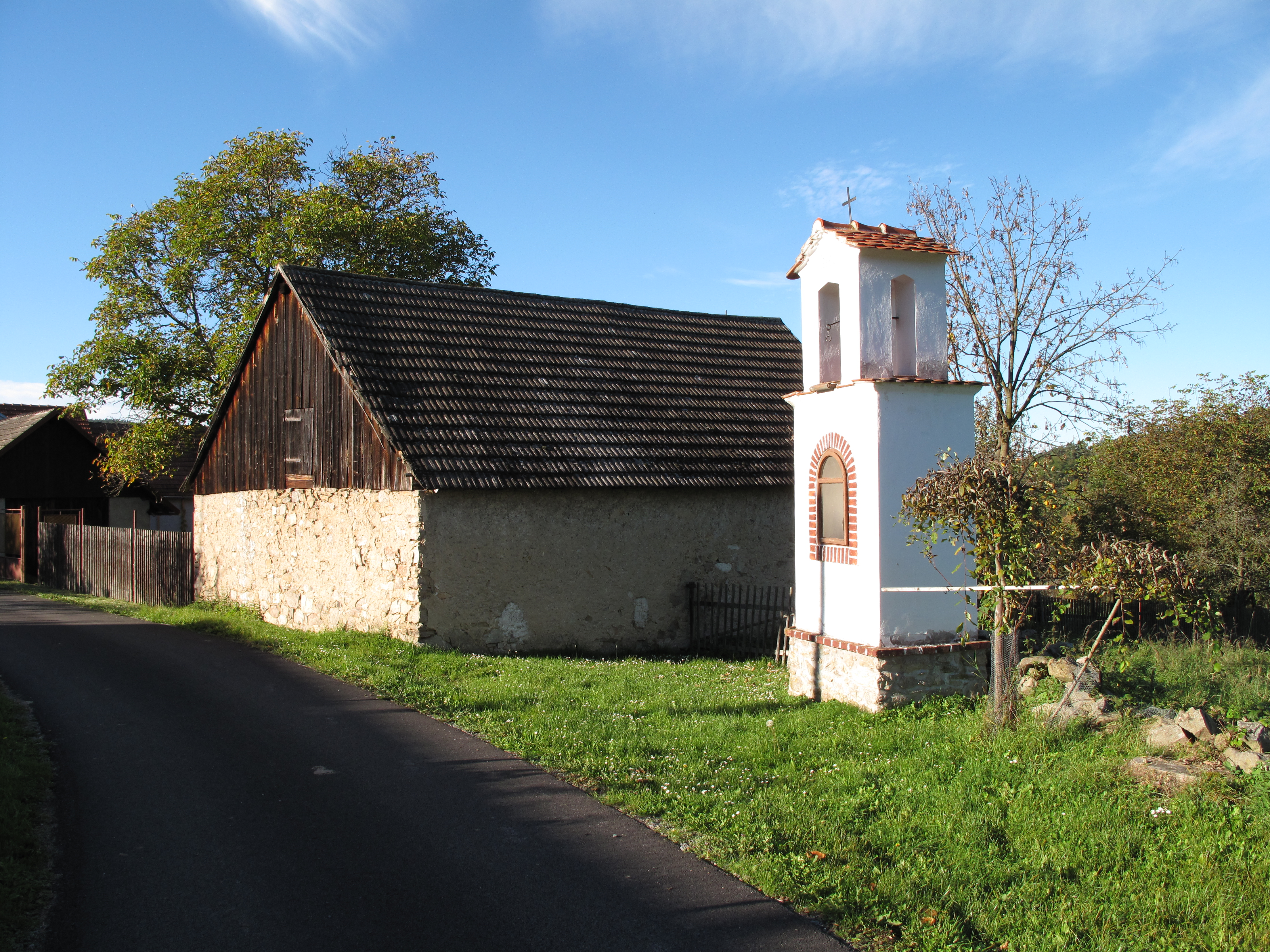 Kaplička v Stuchanově. Okres Příbram, Česká republika.